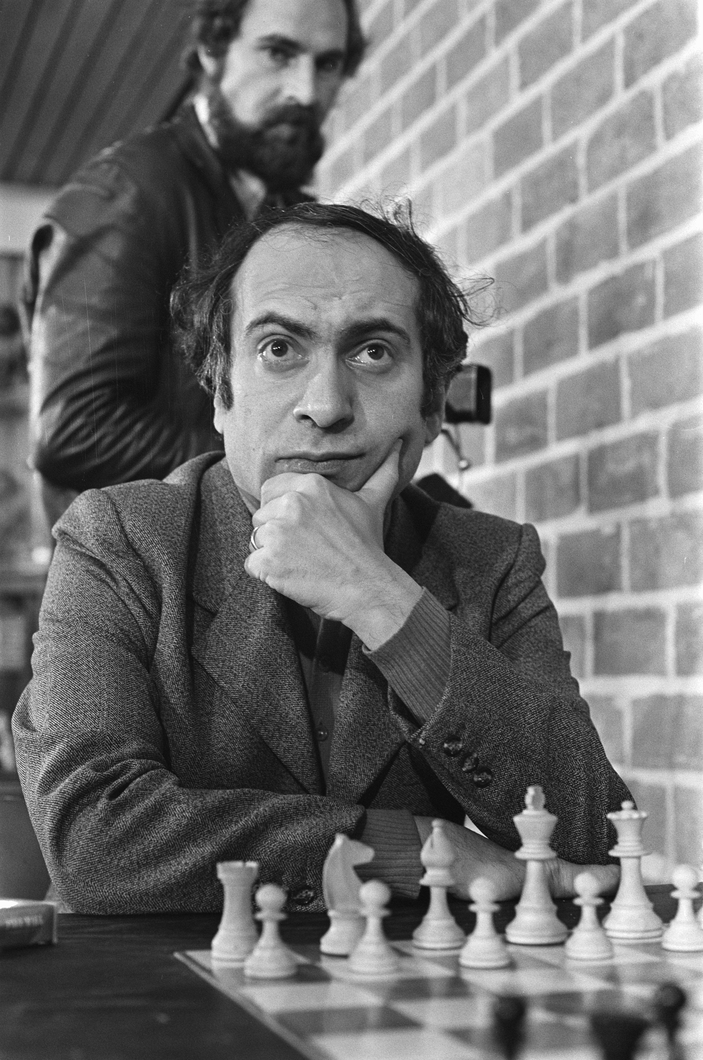 Collectie / Archief : Fotocollectie Anefo Reportage / Serie : [ onbekend ] Beschrijving : Hoogovenschaaktoernooi 1976; Talj, kop Datum : 17 januari 1976 Trefwoorden : schaken Instellingsnaam : Hoogovenschaaktoernooi Fotograaf : Mieremet, Rob / Anefo Auteursrechthebbende : Nationaal Archief Materiaalsoort : Negatief (zwart/wit) Nummer archiefinventaris : bekijk toegang 2.24.01.05 Bestanddeelnummer : 928-3651